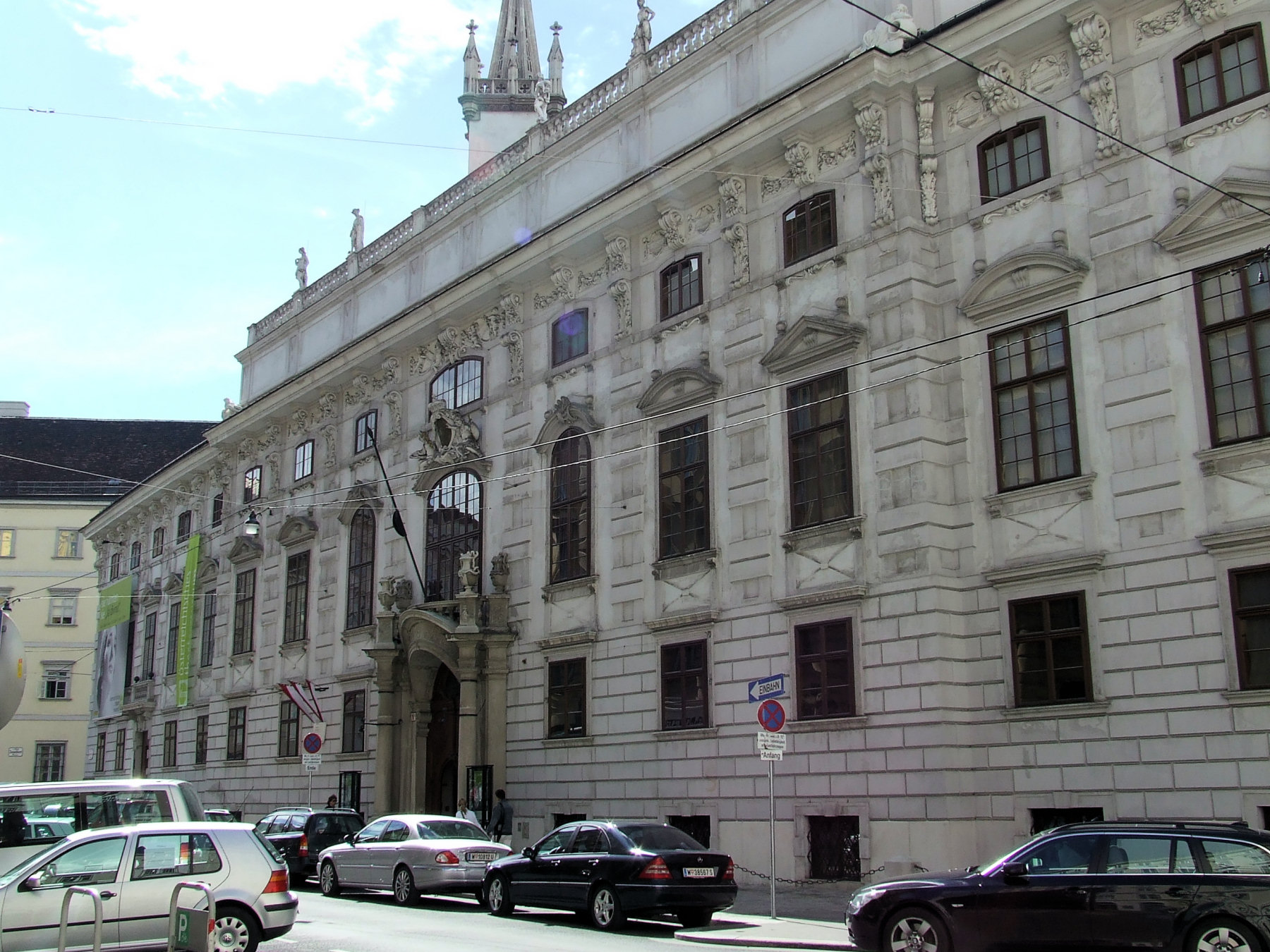 Palais Lobkowitz